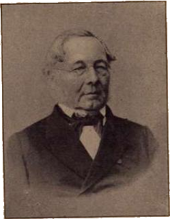 Professor dr. Christian Boeck (1798–1877)